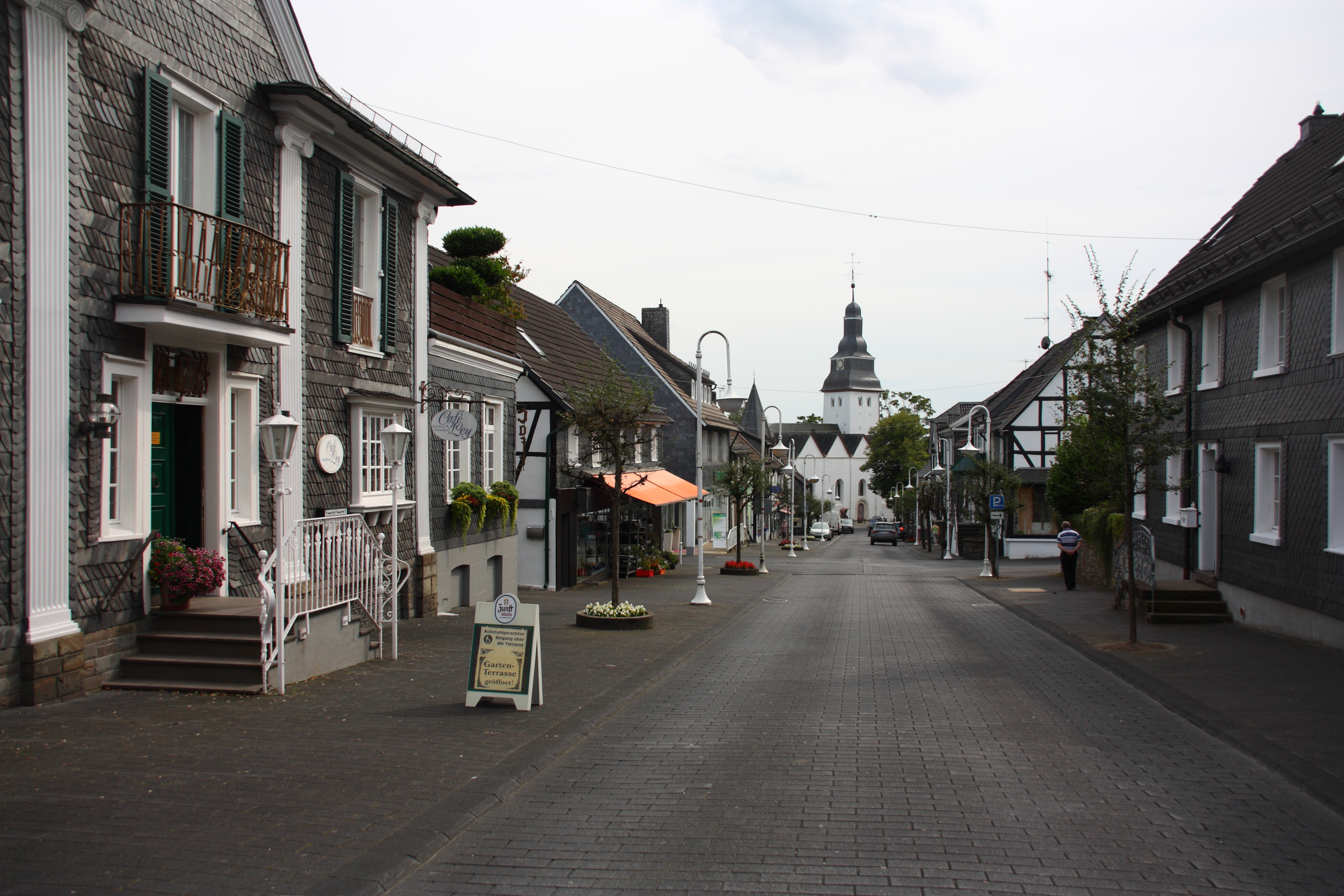 Blick die Hauptstraße hinunter zur ev. Kirche